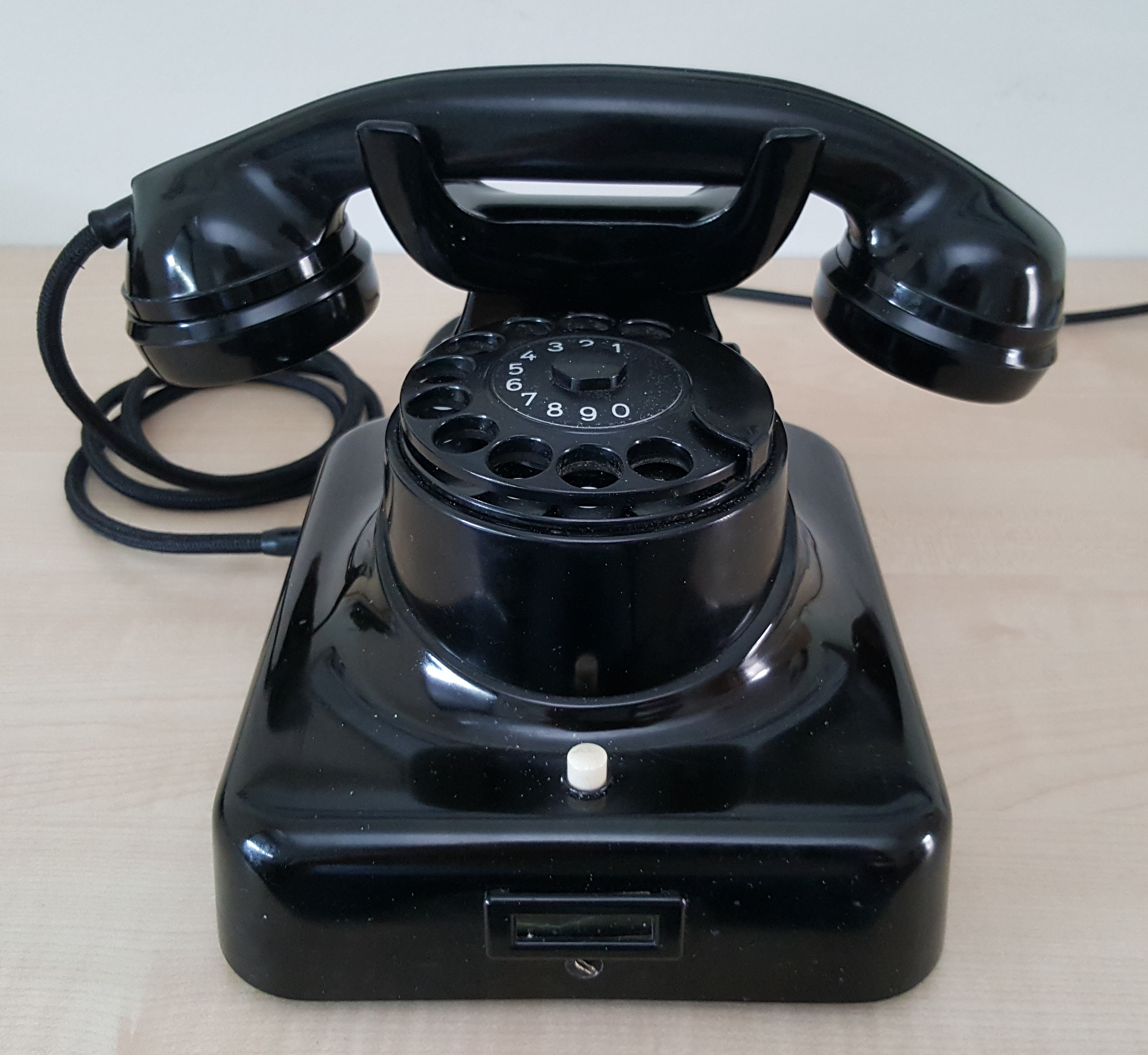 W49 als Tischapparat mit Erdtaste. Gut erkennbar an der waagerechten Wählscheibe.